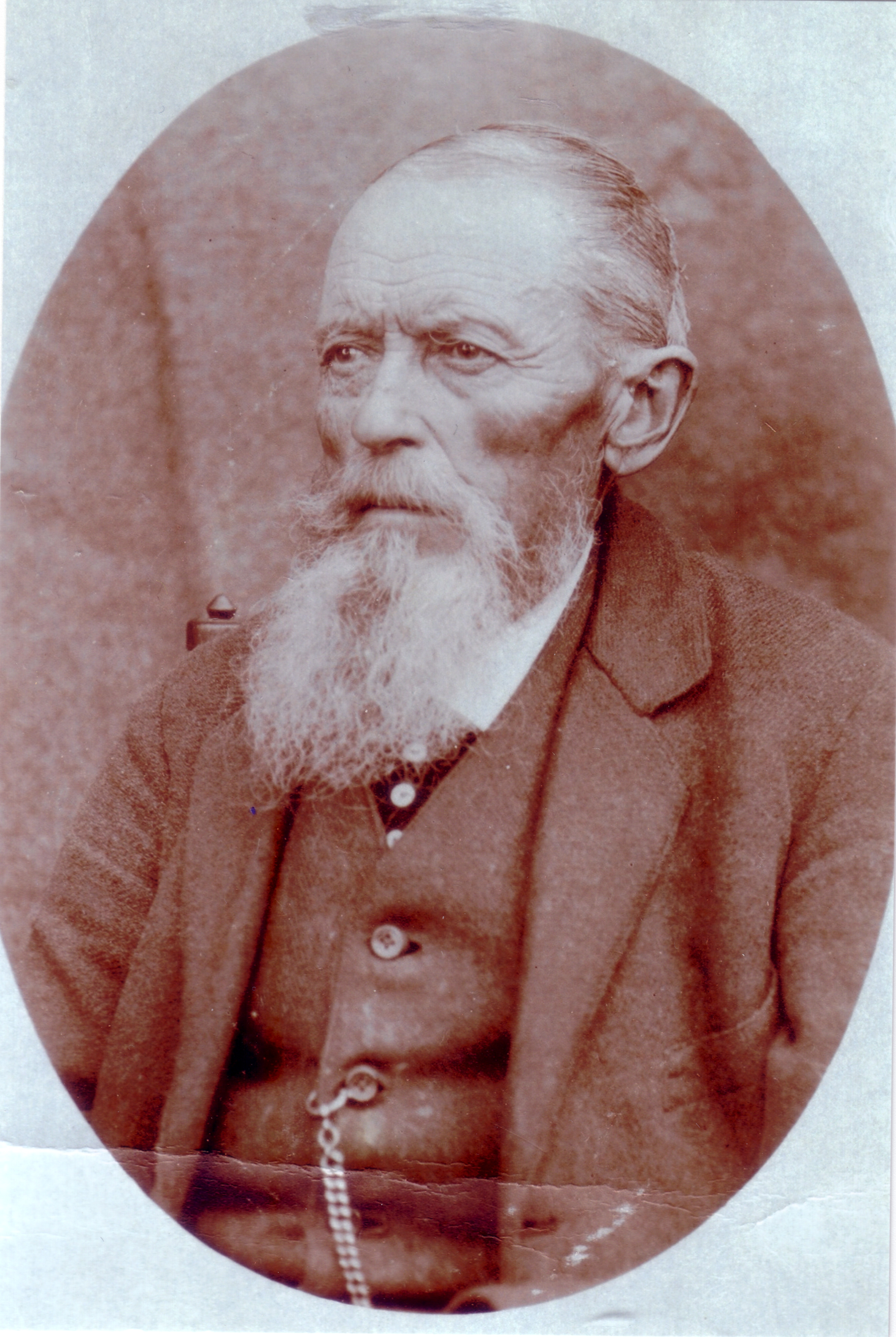 Jan Hinnerk Woerdemann 1851 - 1925